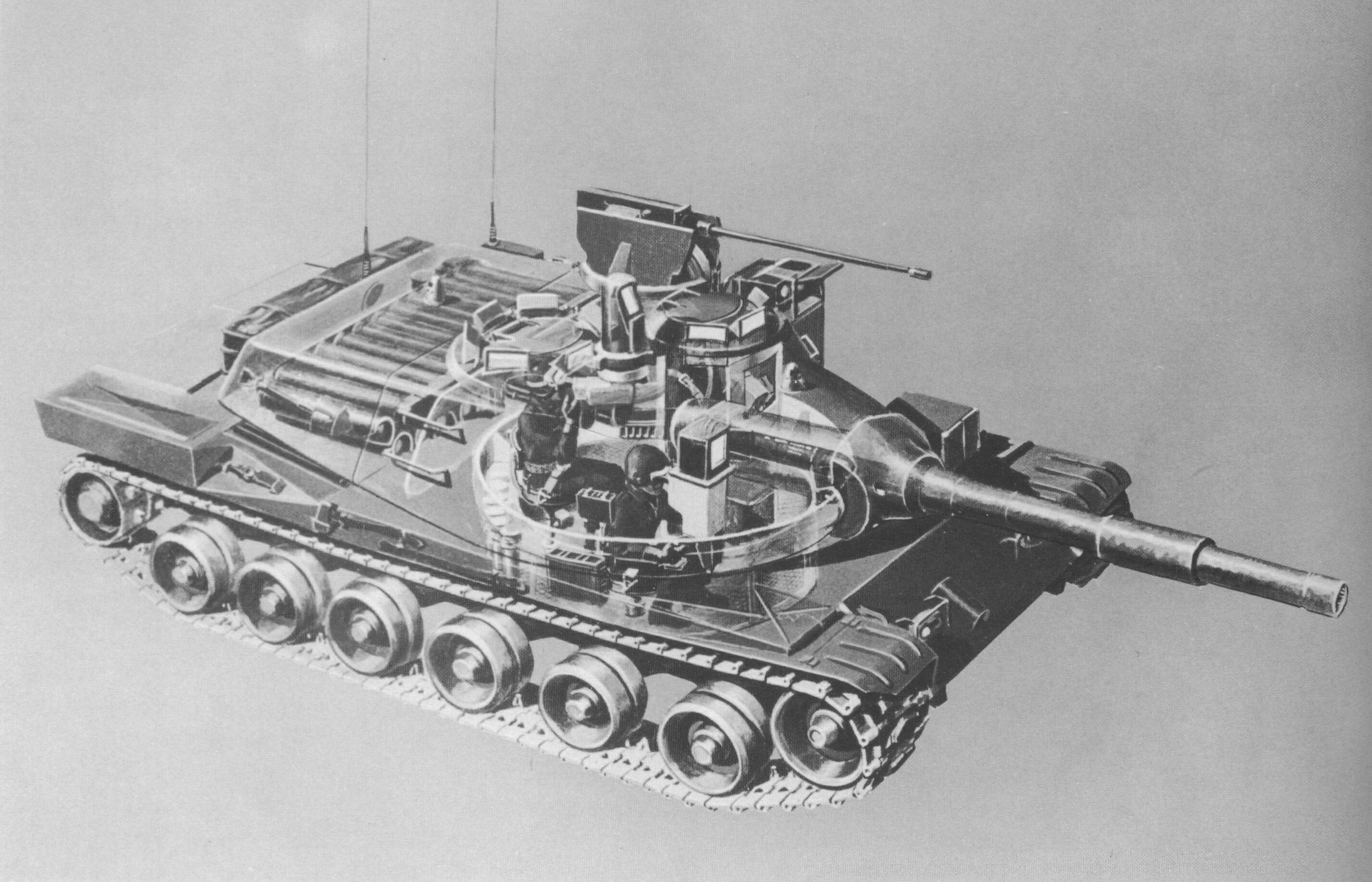 MBT-70 interior arrangement.